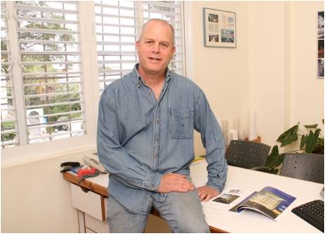 גיל הר-גיל במשרדו, 2014